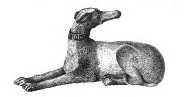 リドニー公園から発掘された犬の像